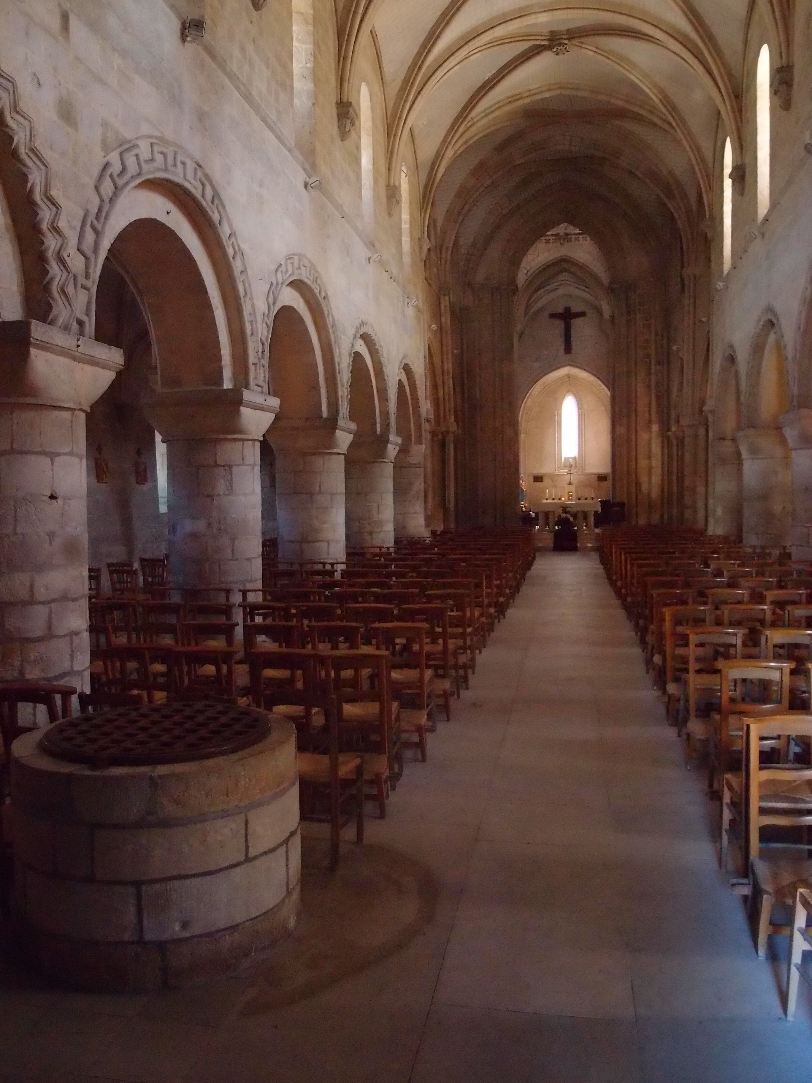 Étretat: Liebfrauenkirche - Mittelschiff (franz.: Église Notre-Dame d'Étretat) Datum: 13.05.2012 Urheber: M. Pfeiffer alias Benutzer:Gordito1869 Quelle: privates Fotoarchiv des Urhebers